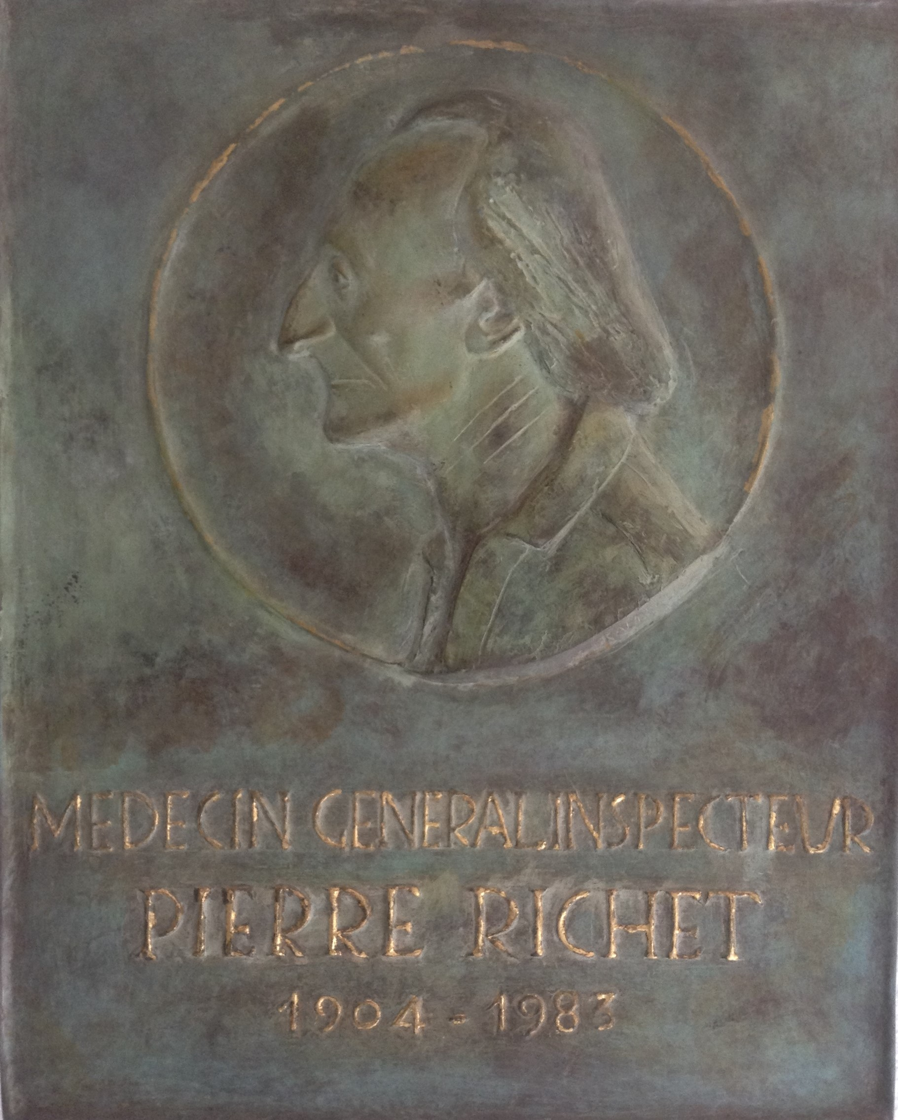 La plaque commémorative apposée à l'IMTSSA